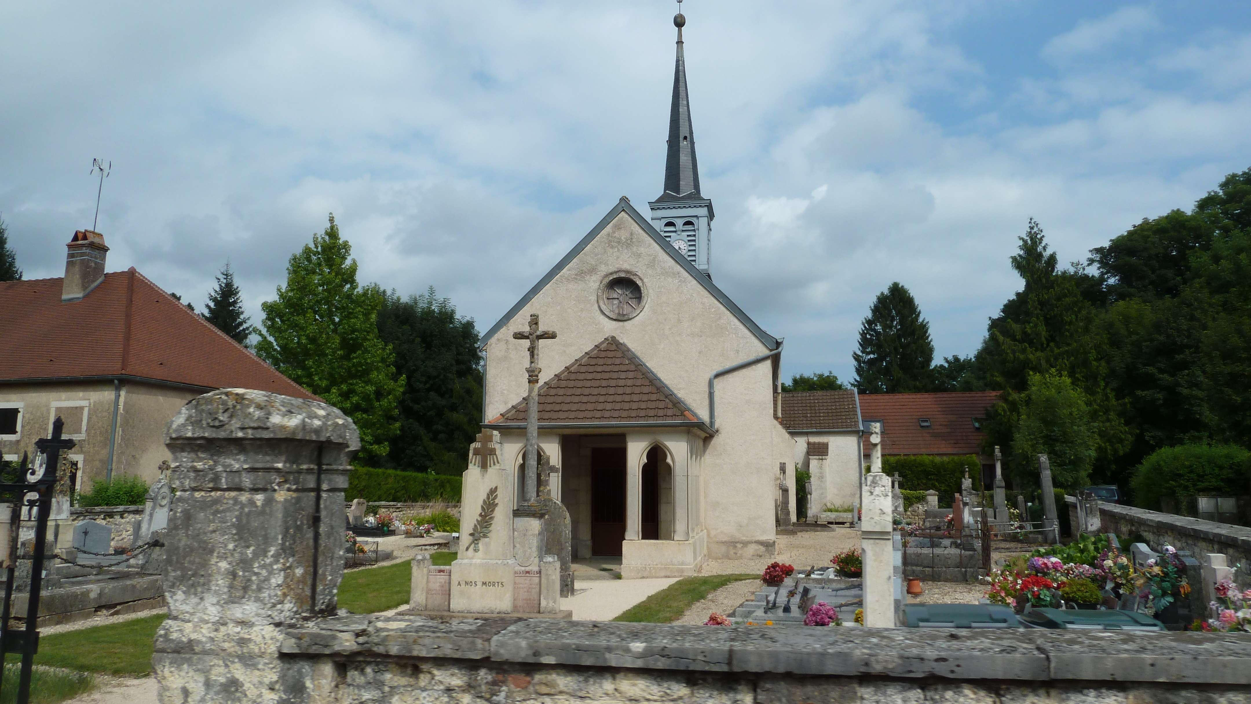 Eglise de Saint Léger Triey.